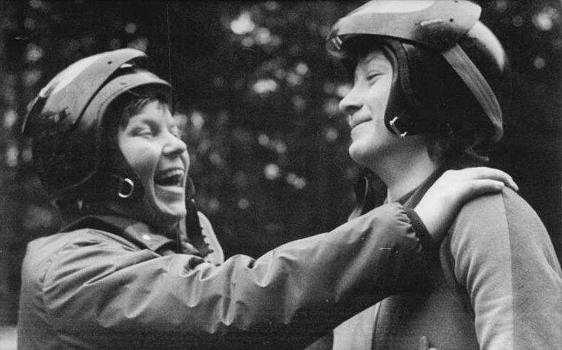 Margit Schumann, Roswitha Stenzel ADN-ZB Schaar st.-5.1.1975-Oberhof: DDR-Meisterschaften im Rennschlittensport 1975-Zwei überglückliche Meisterinnen Margit Schumann (ASK Oberhof-22 Jahre links) siegte bei den Damen und die 15jährige Roswitha Stenzel (SC Traktor Oberwiesenthal) gewann überlegen bei den Juniorinnen B.